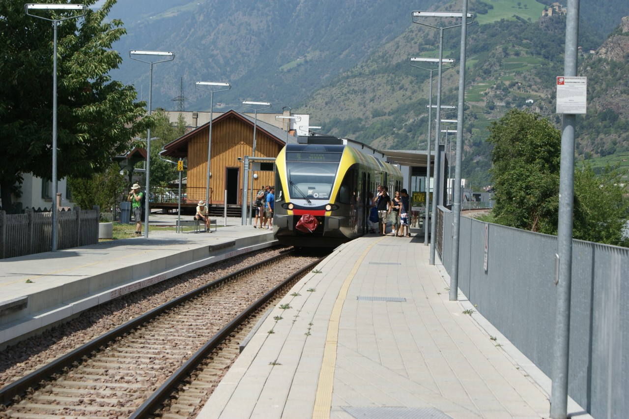 Bahnhof Naturns mit beidseitigem Bahnsteig; der Ein- und Ausstieg ist auf beide Seiten möglich. Stadler GTW 2/6 der SAD, ATR 100-011